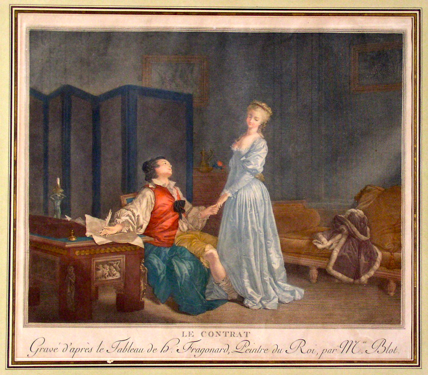 Le contrat